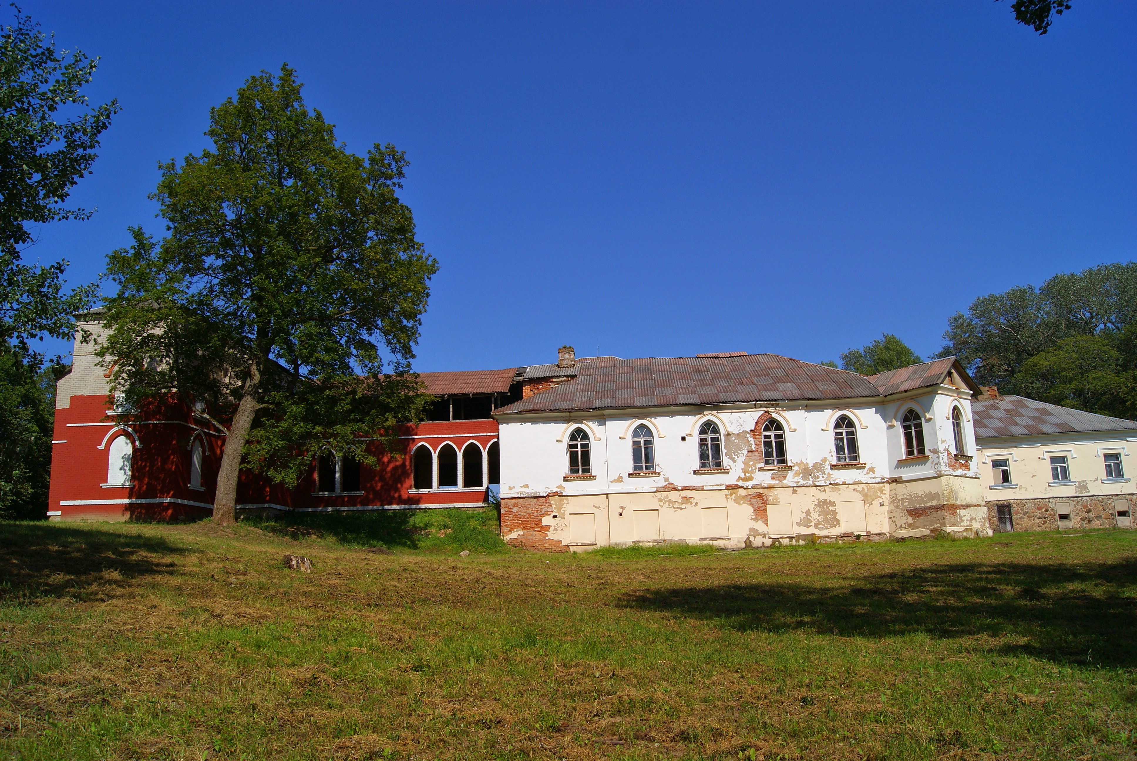 Antanaše manor